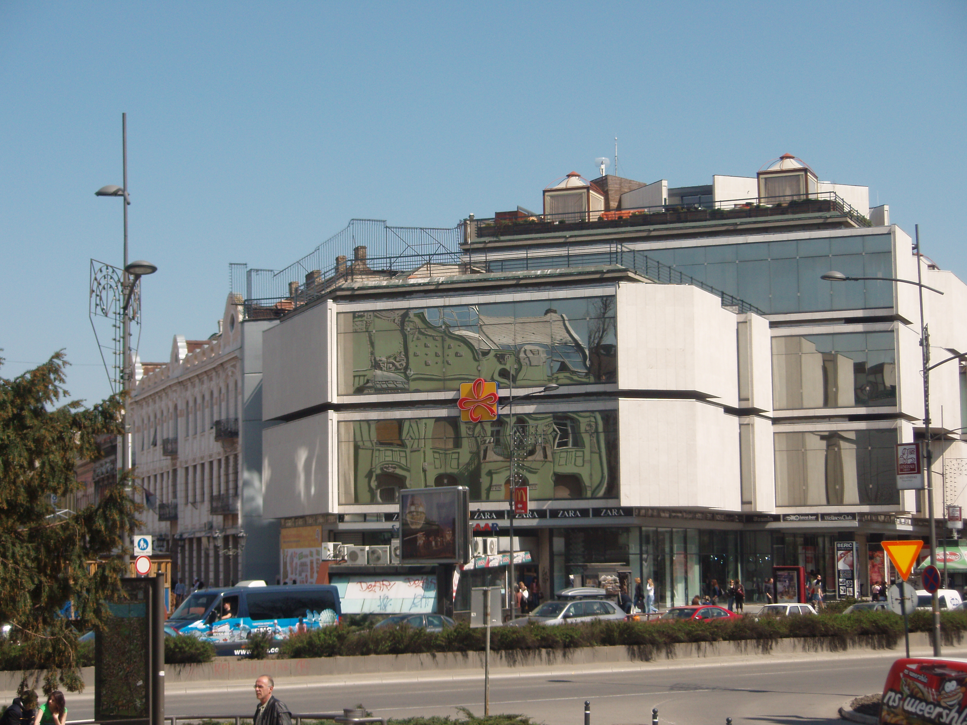 Bazar šoping centar